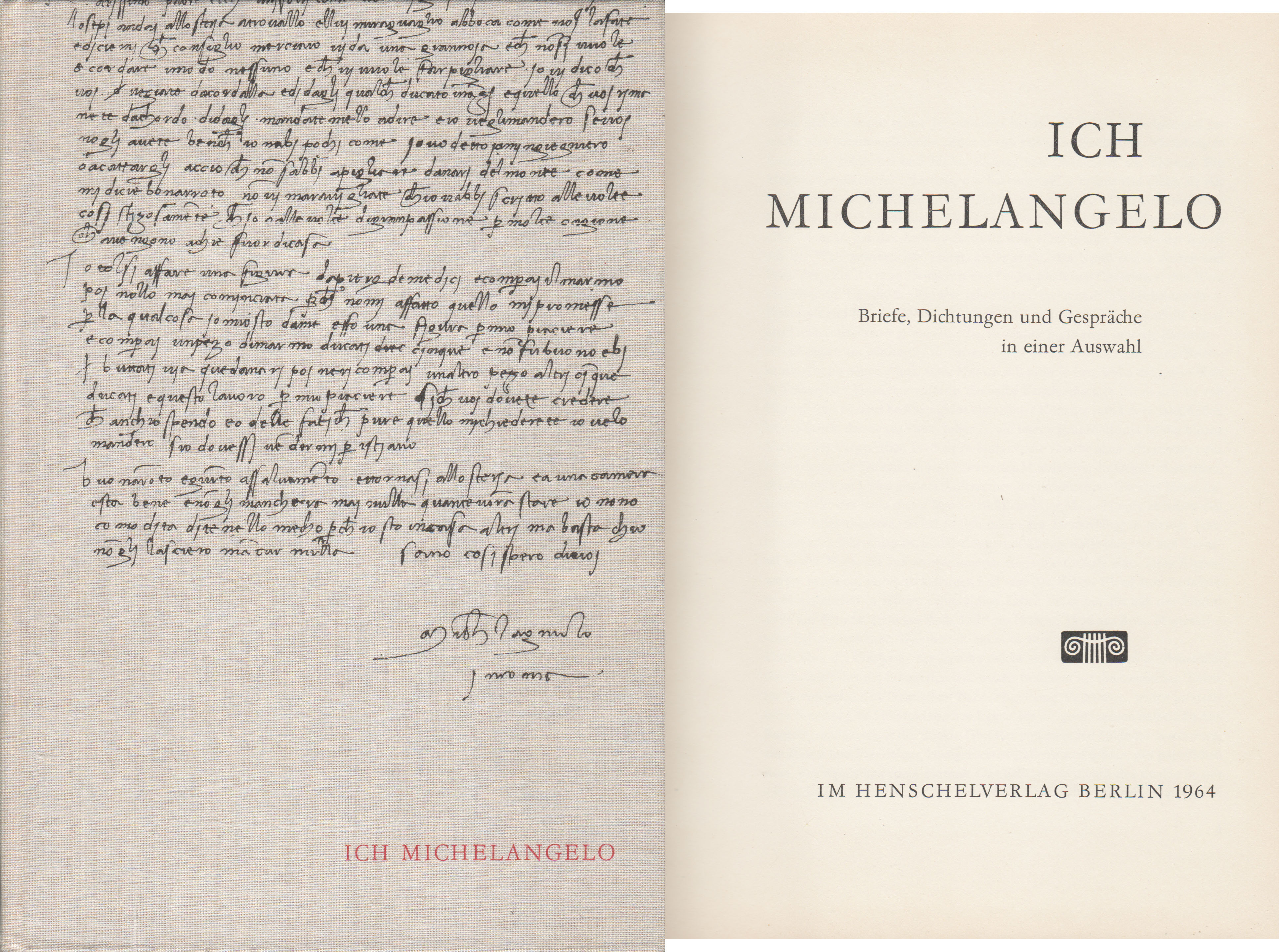 Sammlung von Briefen, Dichtungen, Gesprächen und Fotografien zu Michelangelo und seinen Werken, zusammengestellt von Fritz Erpel, Im Henschelverlag Berlin 1964, das Buch enthält 294 Textseiten und 40 auf hochwertigem Papier eingefügte Abbildungen (ganzseitig). Die Aufnahmen lieferten verschiedene Museen und Bildarchive.